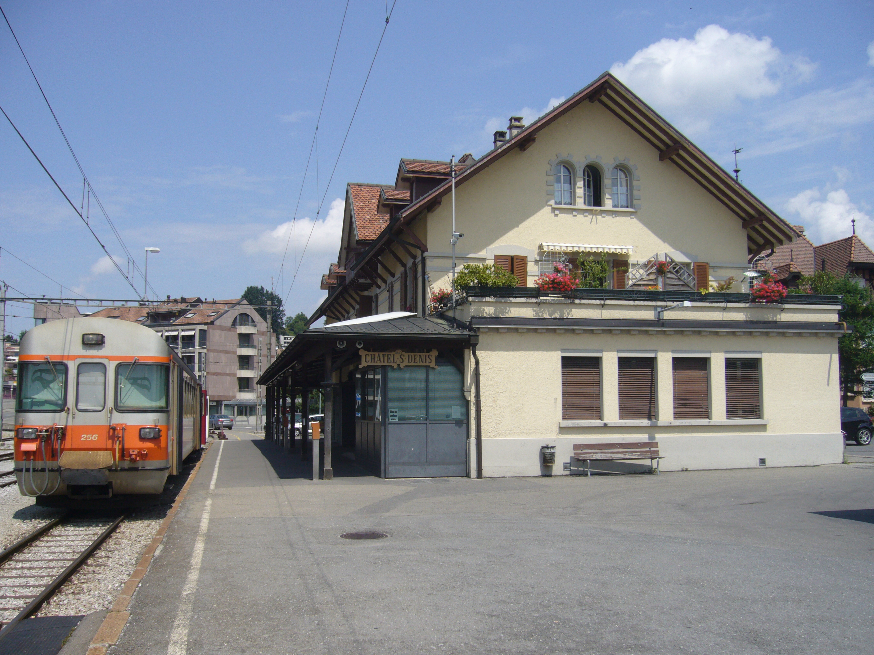 Bahnhof von Kaſtels St. Dionis; links Steuerwagen Bt 256 der TPF.